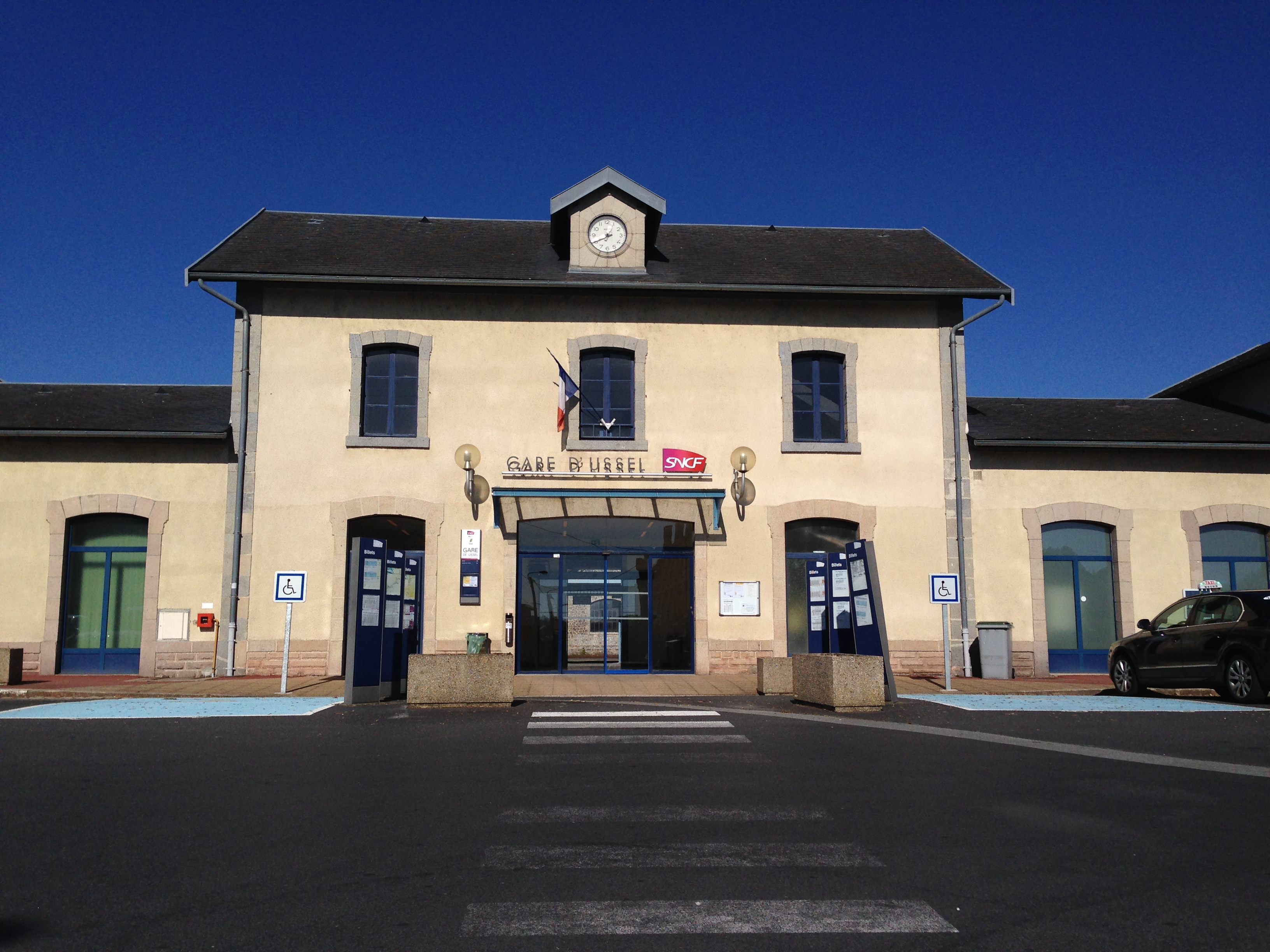 Gare d'Ussel-2014